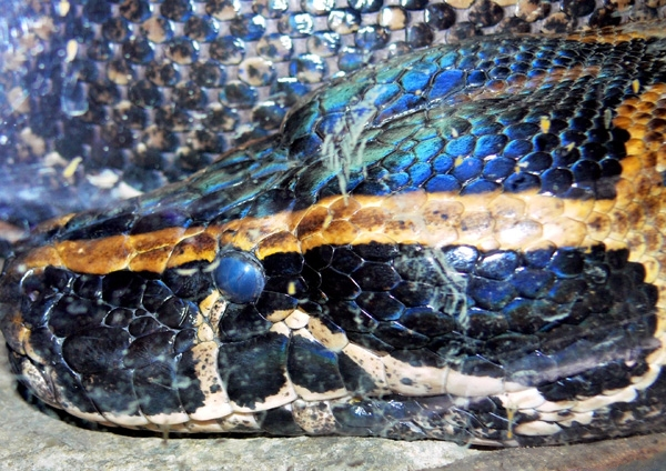 Сетчатый питон (Python reticulatus reticulatus)во время линька глаза змей мутнеют